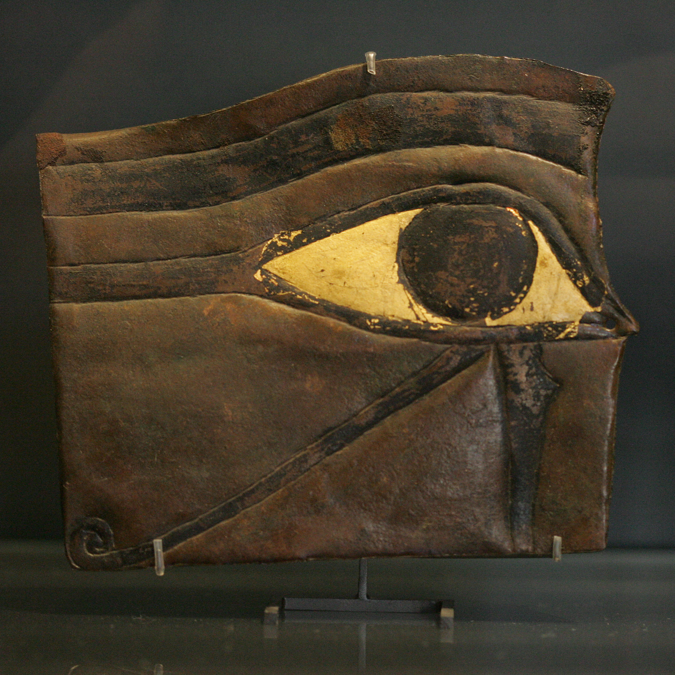 Artist Unknown artistDescription Protection plaque for ventral incisionDimensions H : 11.90 cm.Collection Louvre Museum (Inventory)Native nameMusée du LouvreParent institutionÉtablissement public du musée du LouvreLocationParisCoordinates48° 51′ 37.42″ N, 2° 20′ 15.36″ E Established1793Web page control : Q19675 VIAF: 257711507 ISNI: 0000 0001 2260 177X ULAN: 500125189 LCCN: n80020283 NLA: 35912436 WorldCat institution QS:P195,Q19675Current location Sully Rez-de-chaussée Matériaux et techniques Salle 7Accession number N4369References Louvre.frSource/Photographer Rama Protection plaque for ventral incision